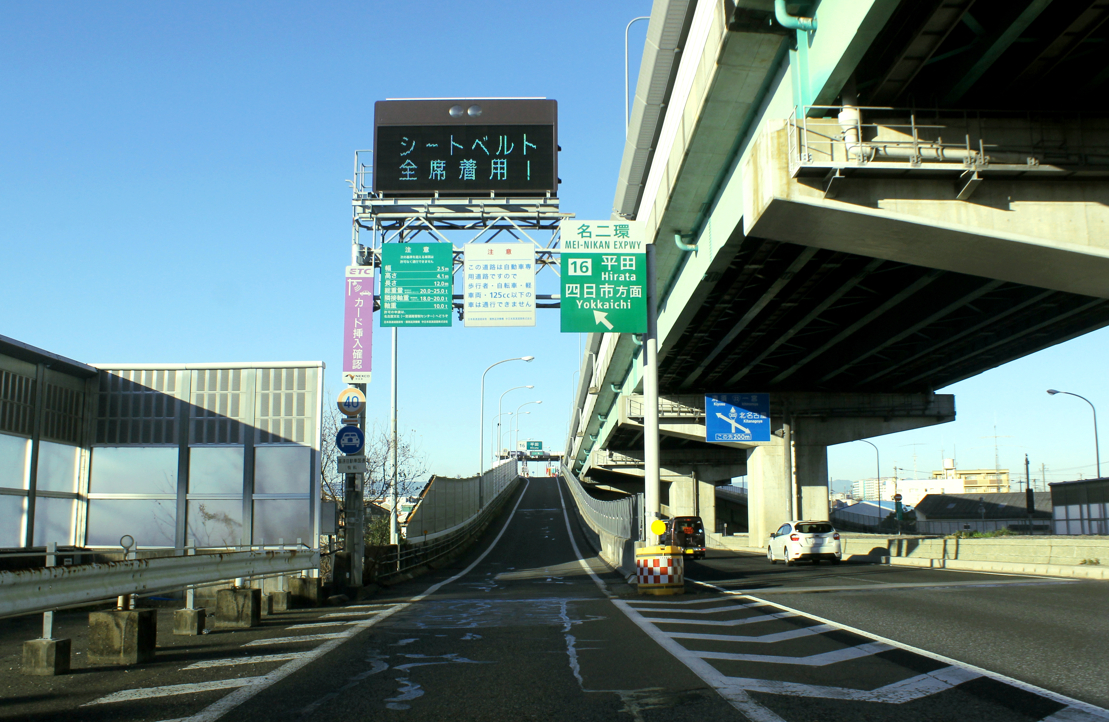 名二環 平田インターチェンジ